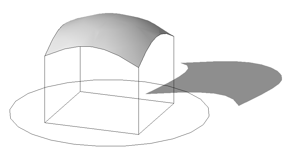 Wycinek sfery